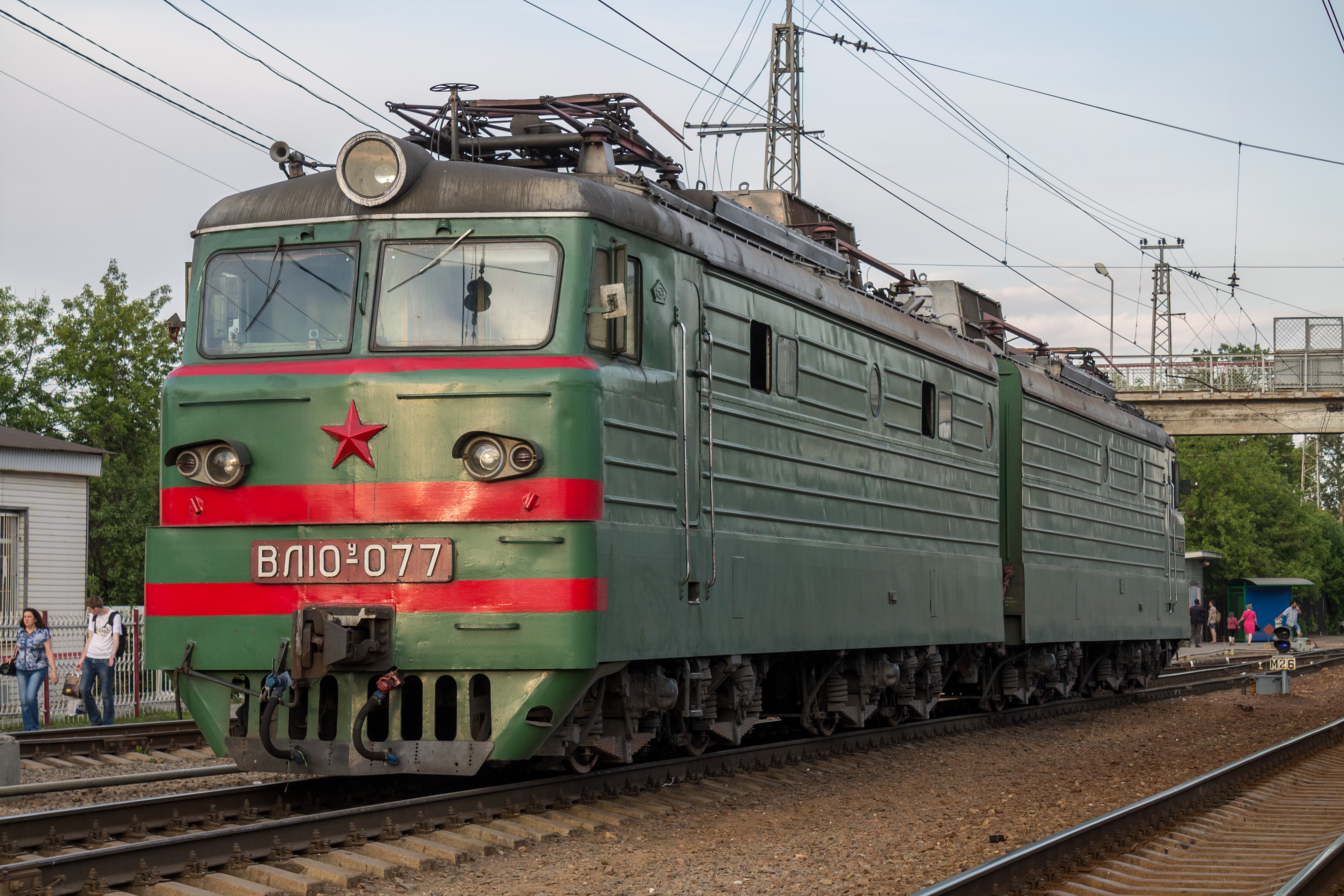 ВЛ10У-077, станция Нахабино см. фото 696473 в альбоме автора